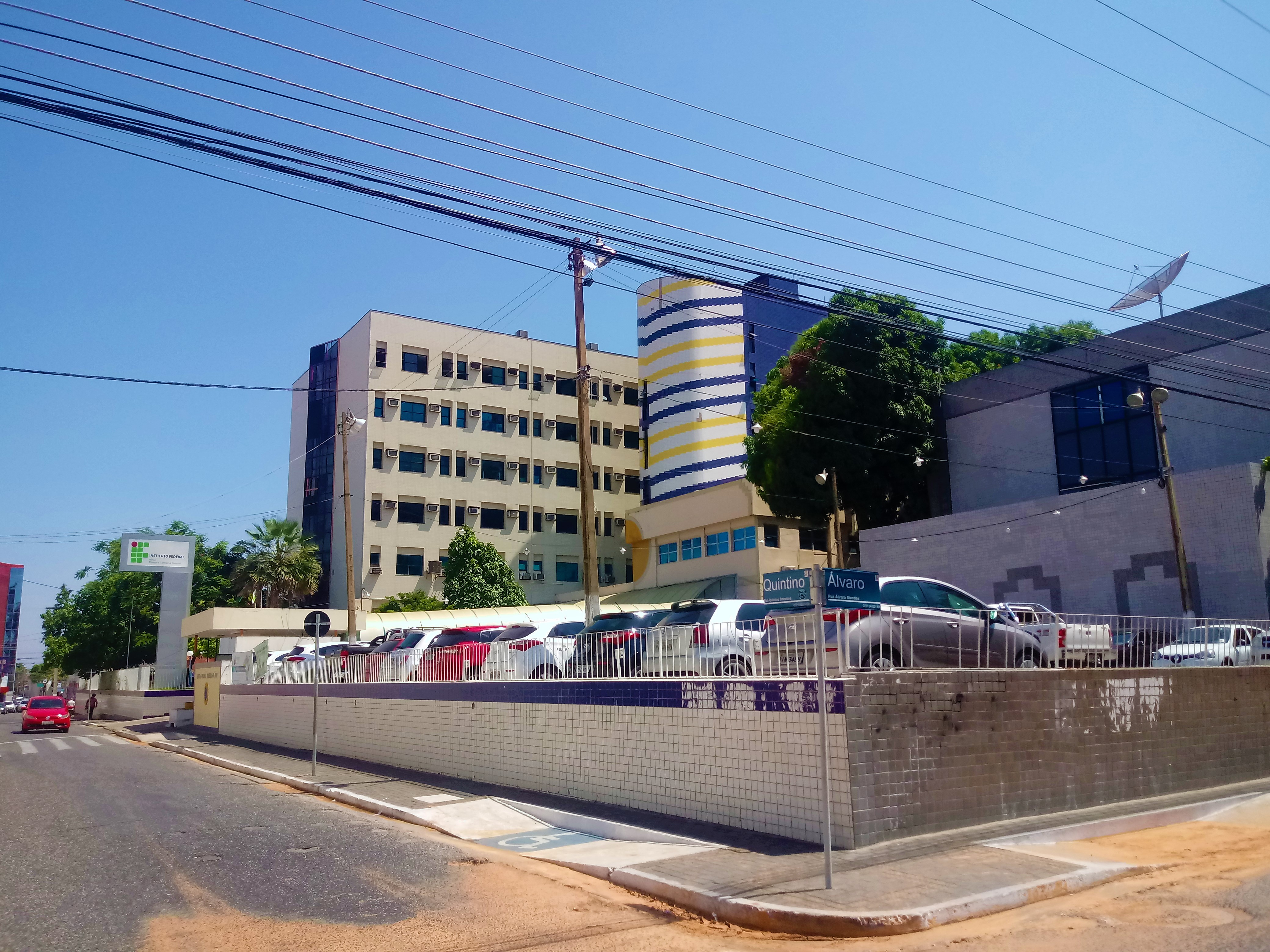 Vista da esquina do Instituto Federal do Piauí.